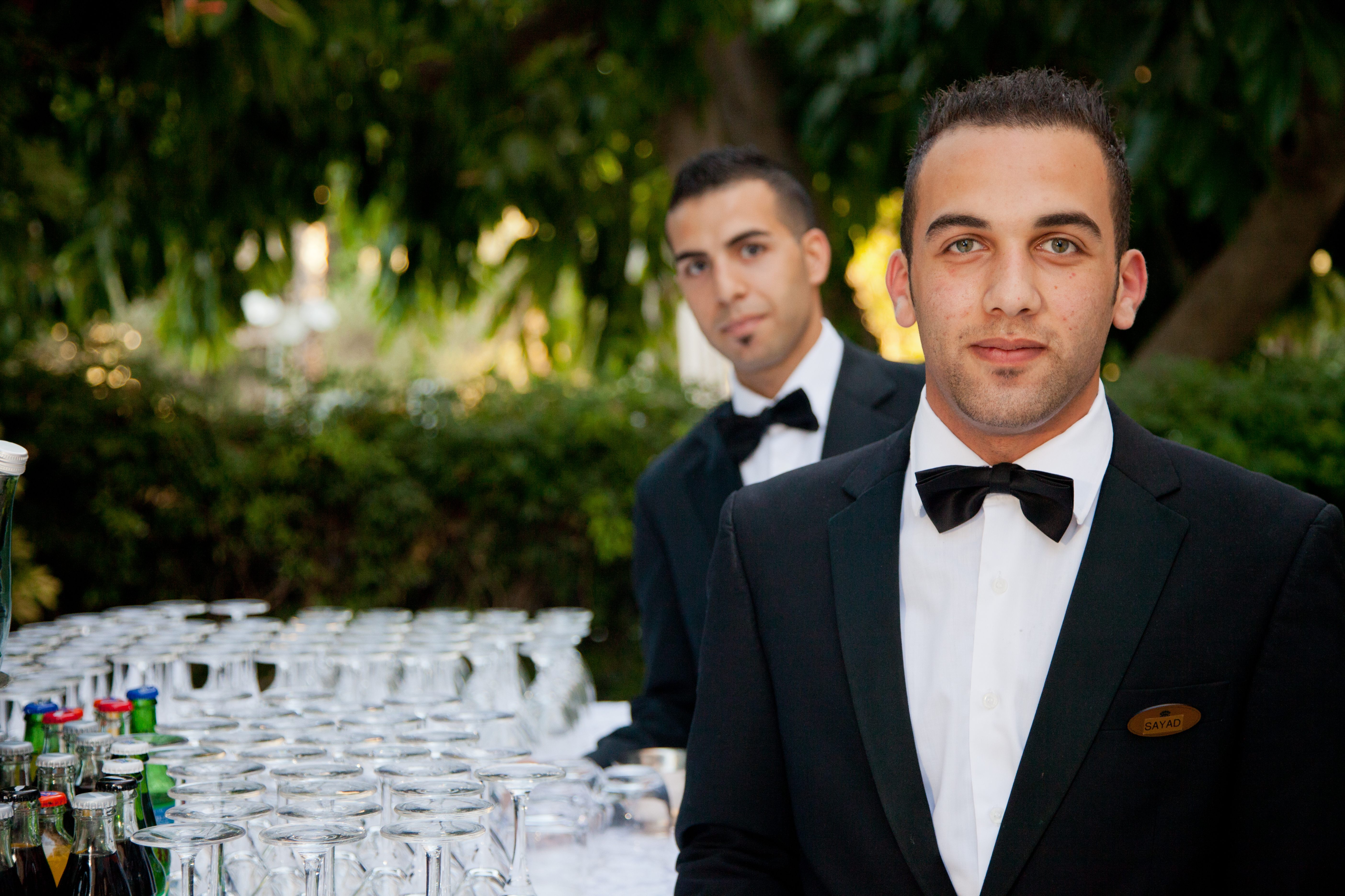 מלון המלך דוד